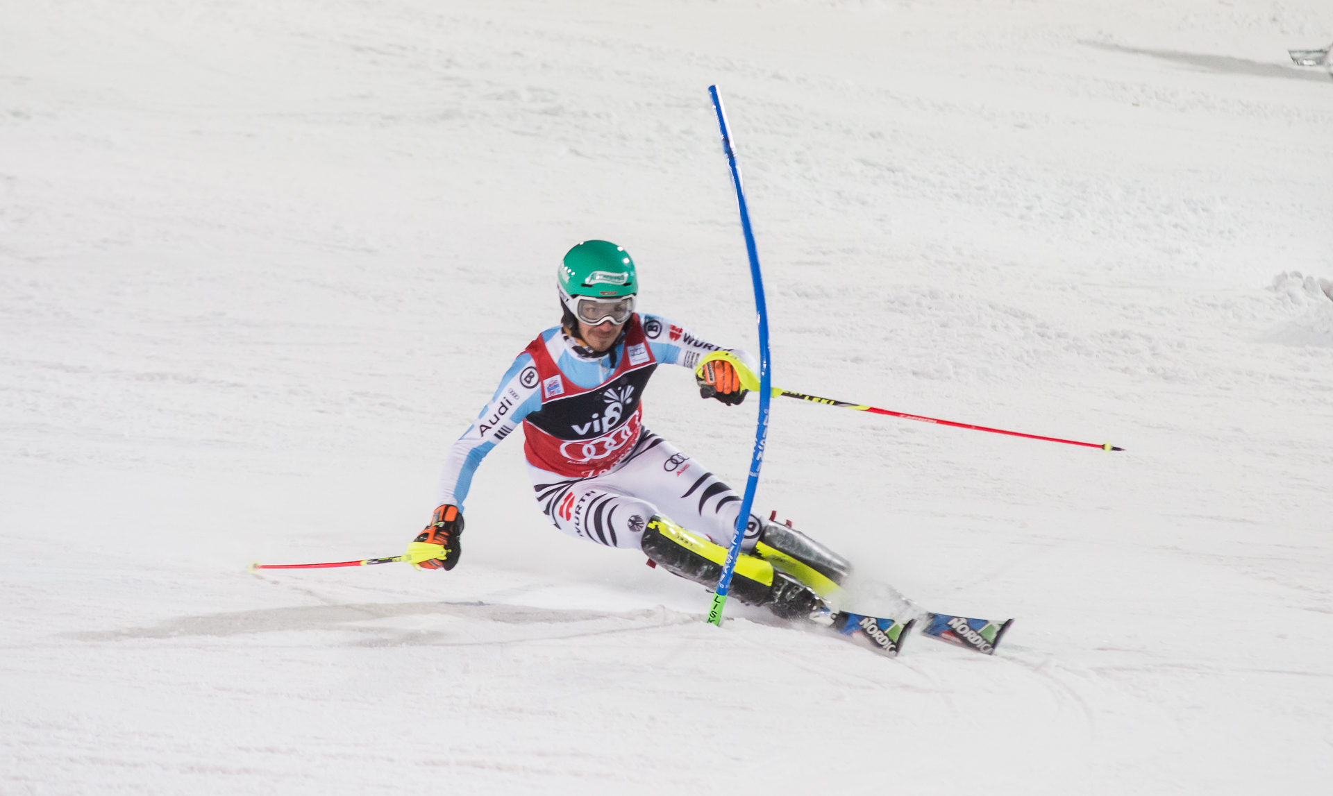 NEUREUTHER Felix